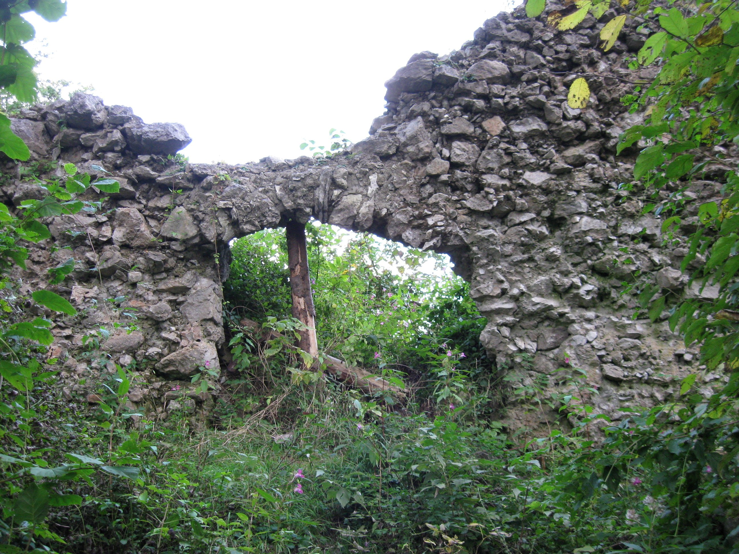 Burgruine Kirnstein, von der 1504 zerstörten Burg Umfassungsmauern in Teilen und Reste des Palas erhalten, mittelalterlich, 2. Viertel 15. Jh.